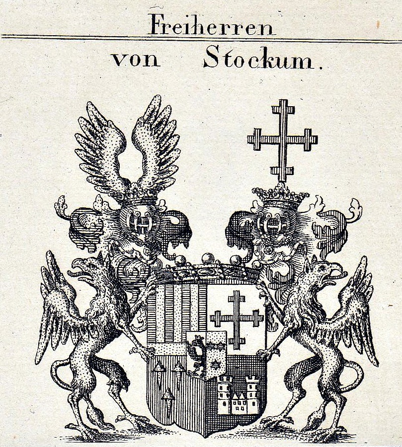 Wappen der Freiherrn von Stockum